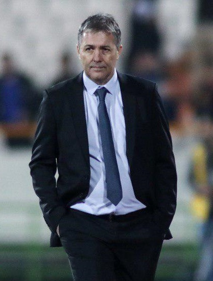 نگاره‌ای از دیدار دو تیم استقلال و صنعت نفت آبادان در ۱۴ آبان ۱۳۹۸ در ورزشگاه آزادی که تیم استقلال با نتیحه ۵-۰ پیروز دیدار شد. (مشاهده گزارش بازی)